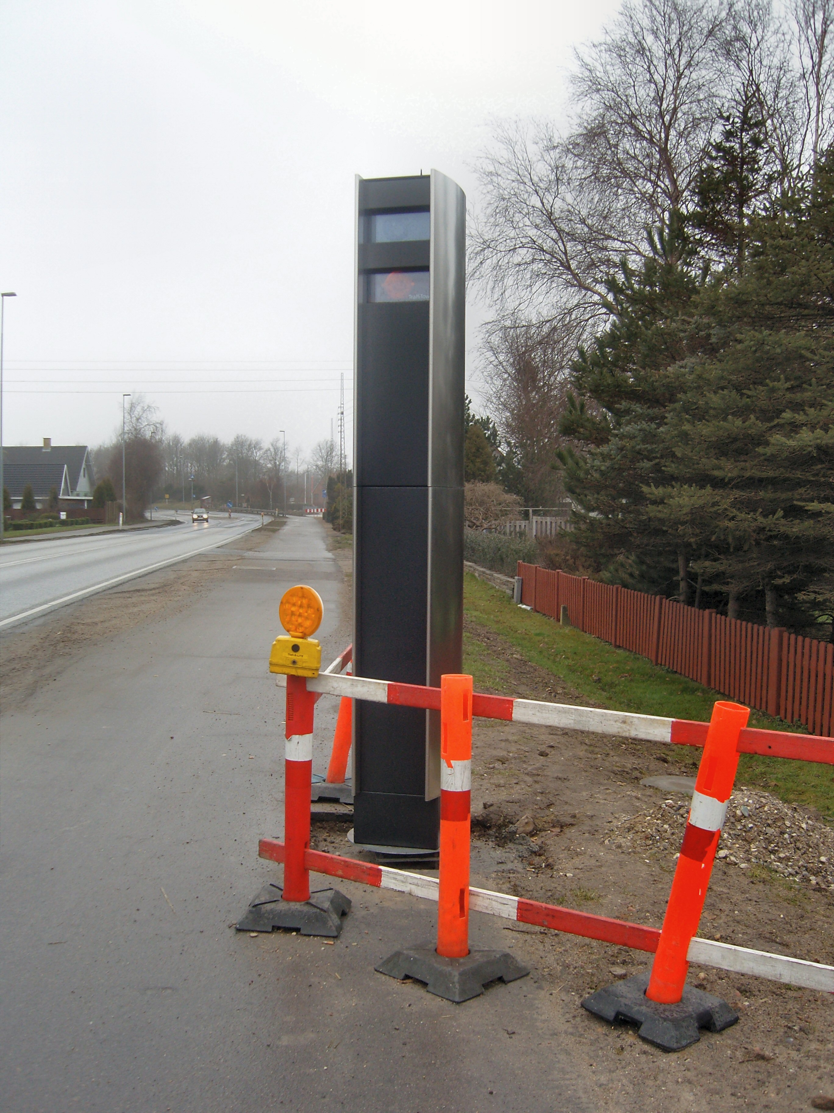 Fotostander til hastighedsmåling